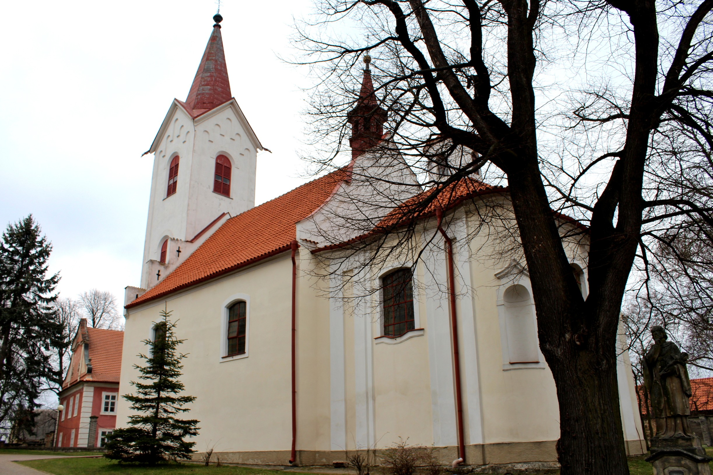 Ořech (Praha-západ)